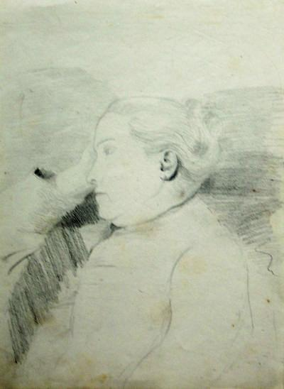 Self-portrait